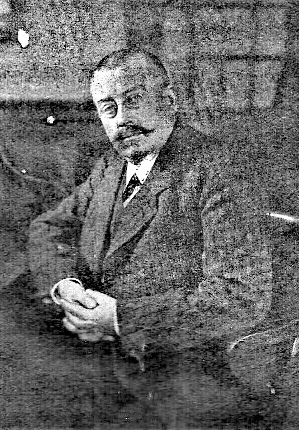 Wilhelm Beth, Seniorchef der Maschinenfabrik Beth A. G., starb am 27. August 1922.